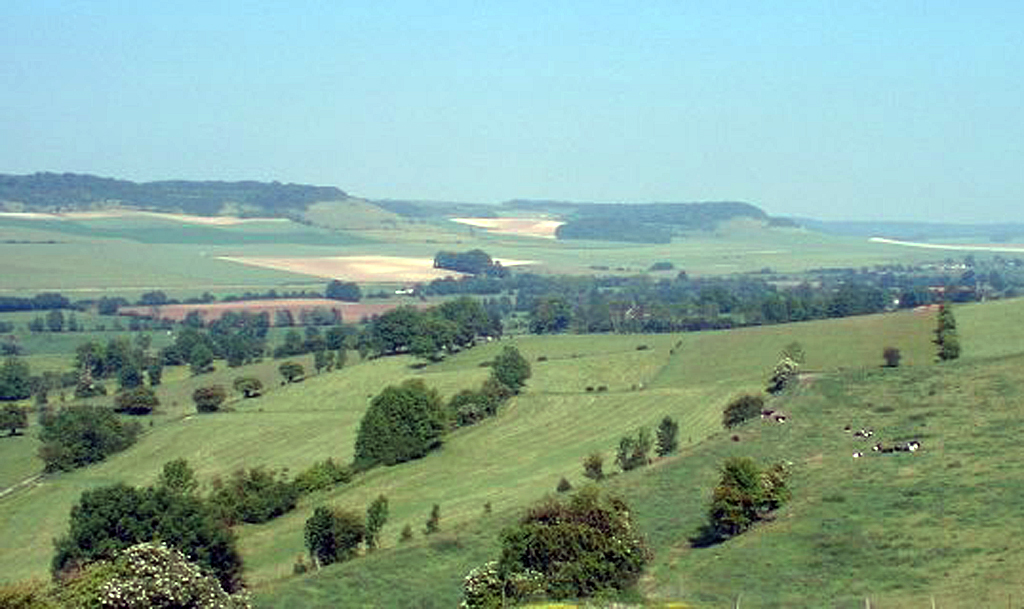 Vallée de la Béthune, près de Ricardville-du-Val.